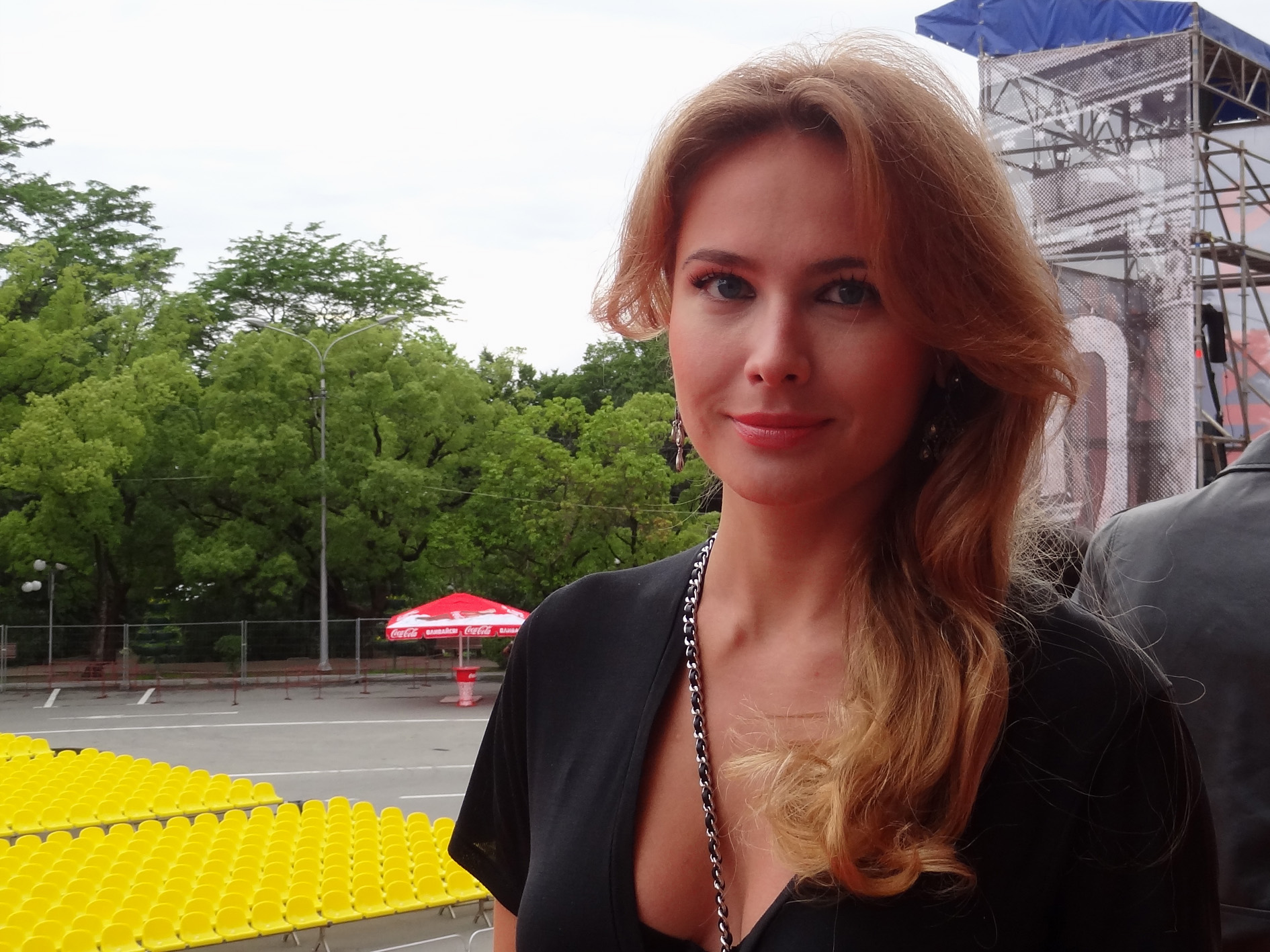 Анна Андреевна Горшко́ва — российская актриса и фотомодель. Церемония открытия фестиваля "Кинотавр -2014" в Сочи.